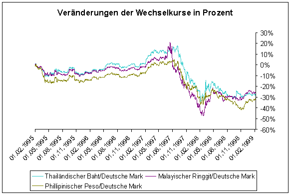 Exchange rate Asian Crises 97, prozentuale Veränderung zum Ausgangswert 01.02.1995